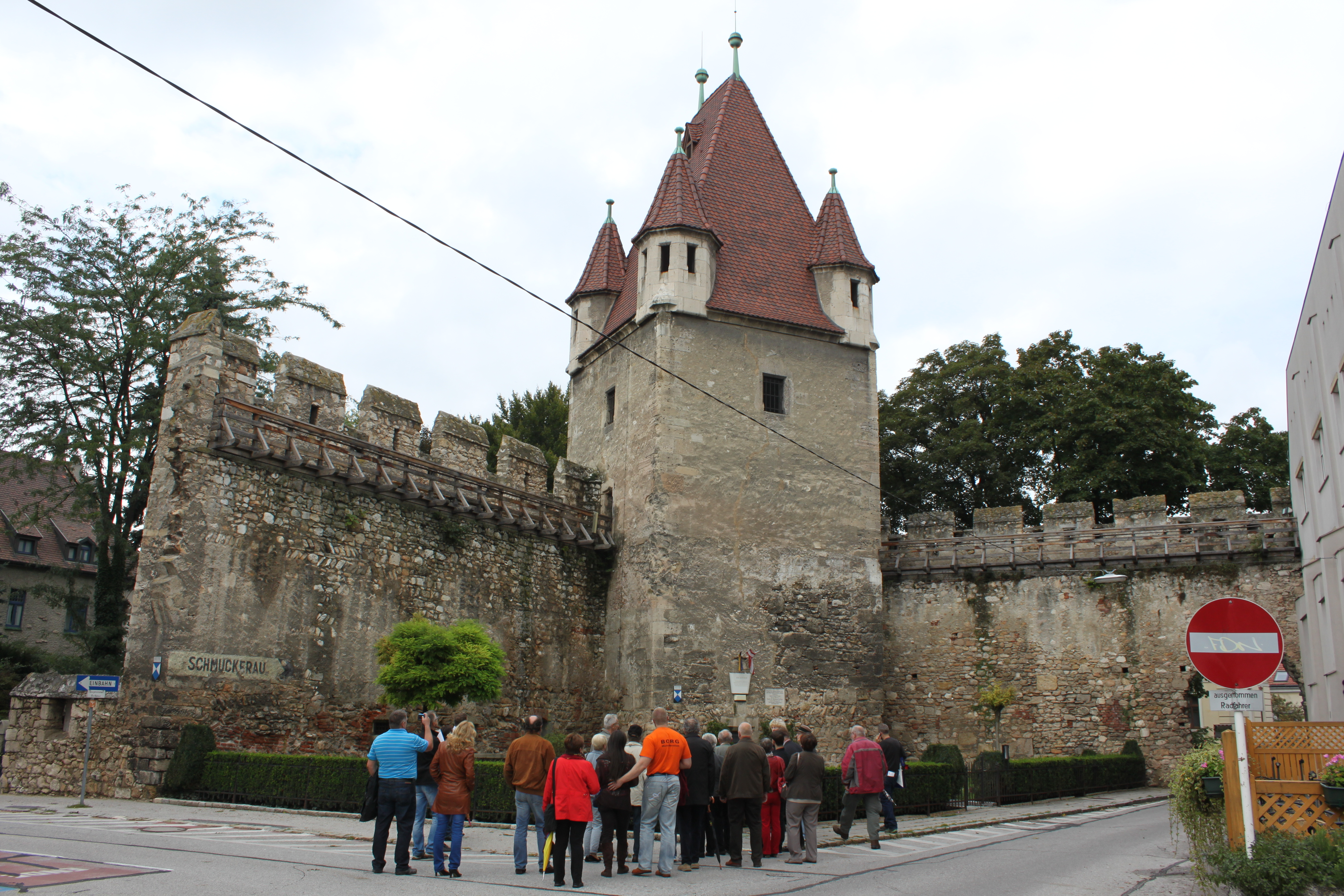 Teile der Stadtbefestigung, Reckturm, Erwin Reidinger erklärt die Gründungsvermessung 1192 der Stadt Wiener Neustadt und den Absteckpunkt beim Reckturm